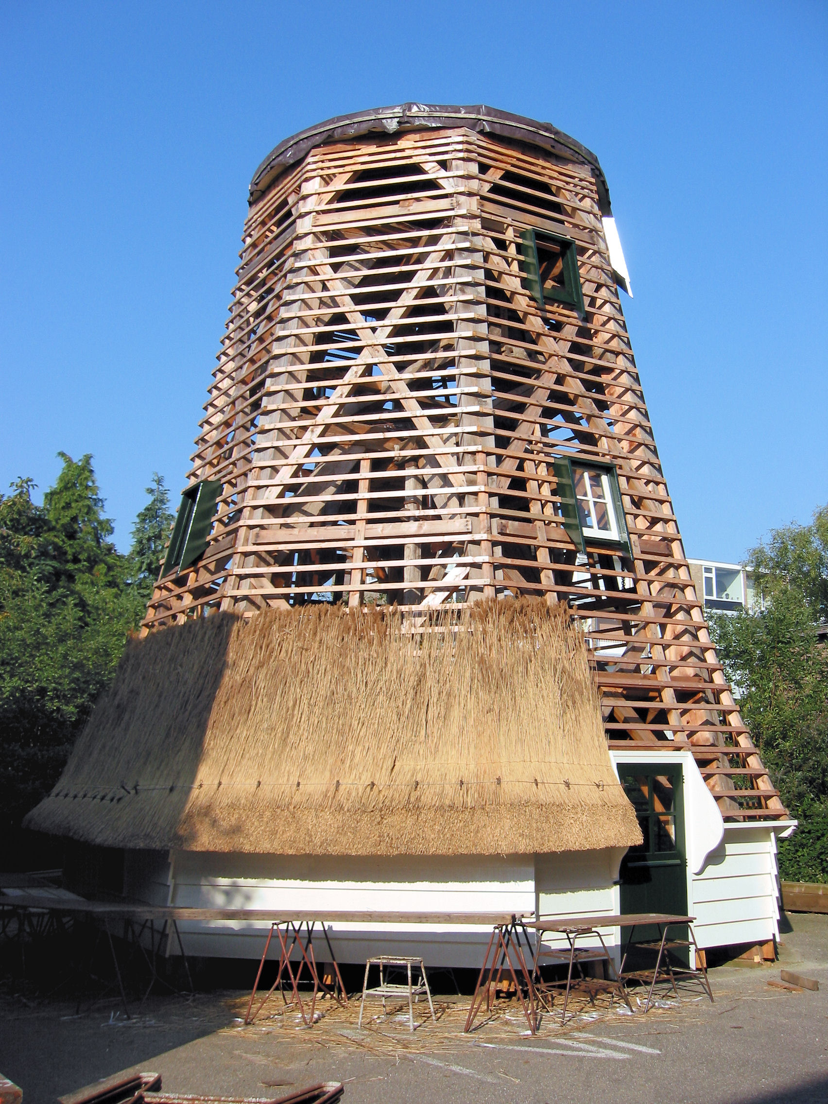 Gerestaureerde houten achtkant met begin van riet van de Concordia molen te Ede 23 September 2007